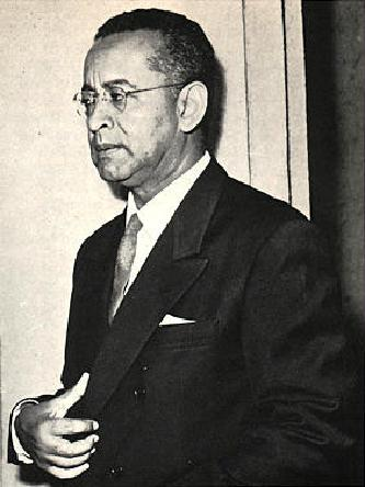 Foto de Adalberto Ortiz